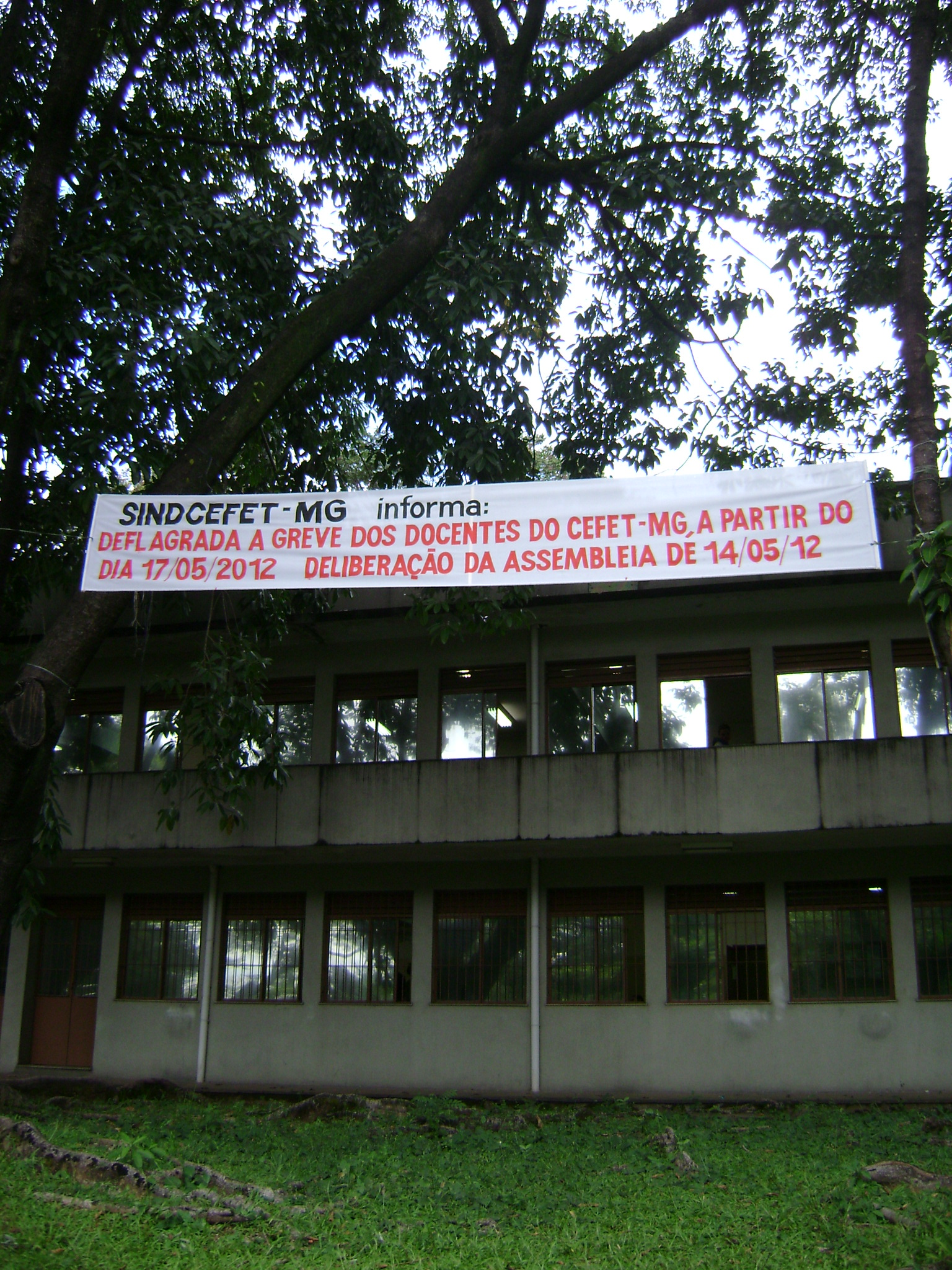 Anúncio de deflagração de greve no Centro Federal de Educação Tecnológica de Minas Gerais, em Belo Horizonte, Brasil.